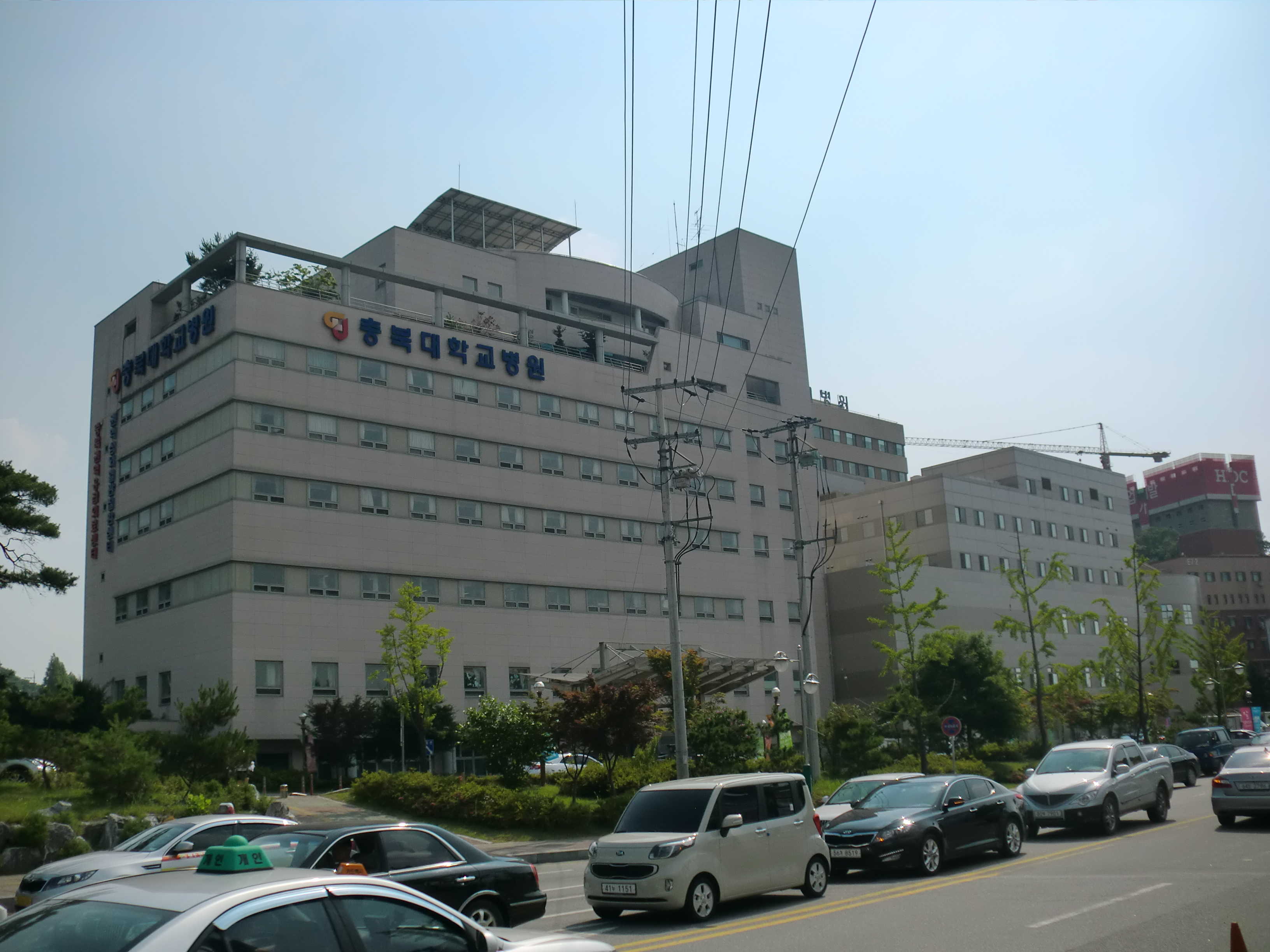 충청북도 청주시에 있는 충북대한교병원